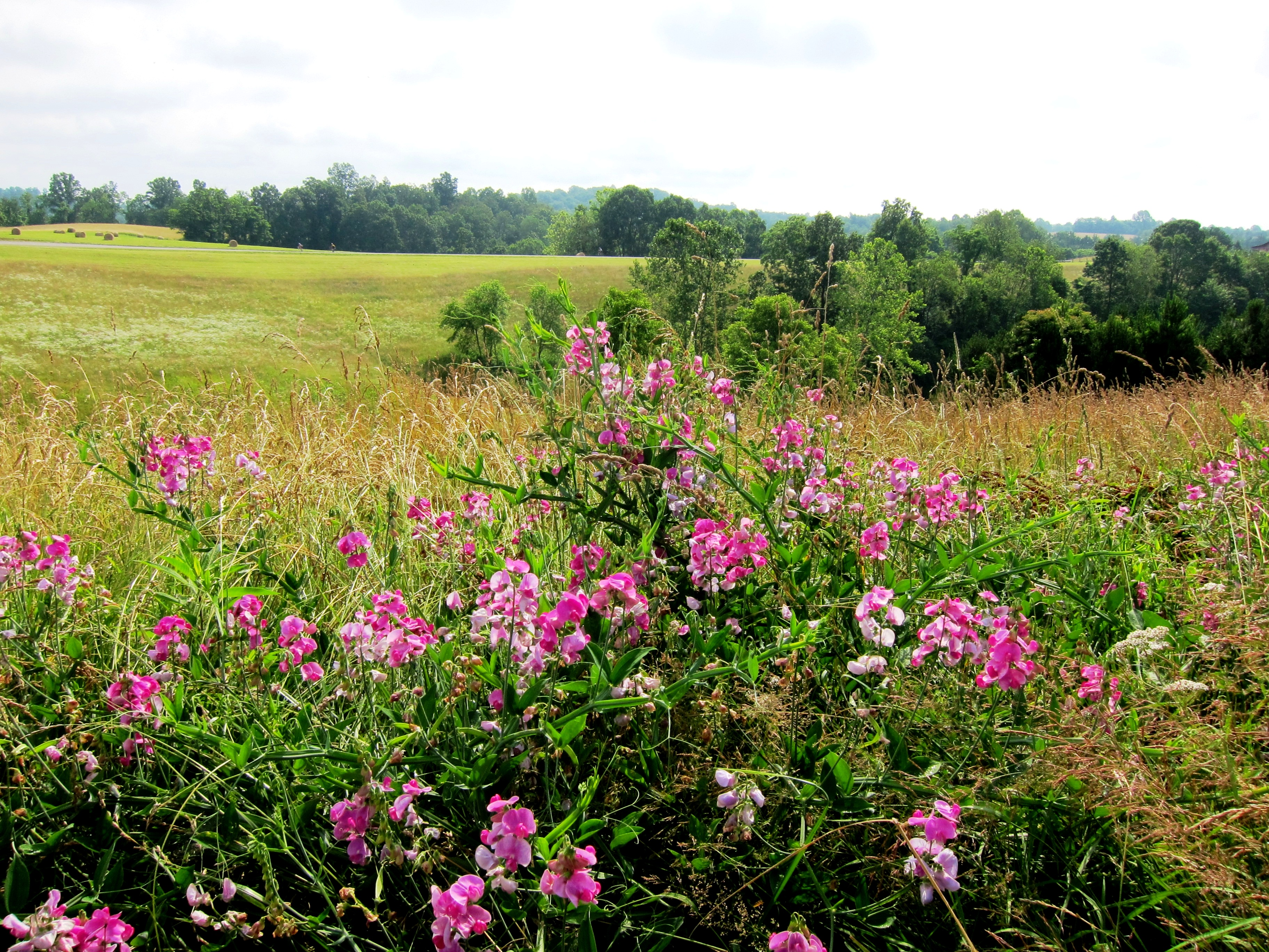 Fertile Field